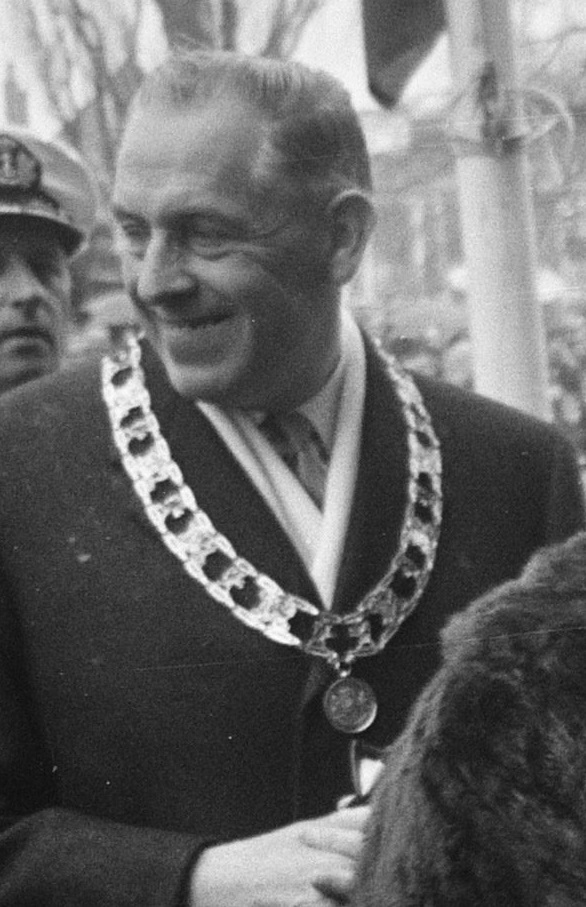 Burgemeester Johannes (J.S.) Brandsma van Leeuwarden; herdenking in Leeuwarden van 25 jaar bevrijding van Friesland in aanwezigheid van koningin Juliana